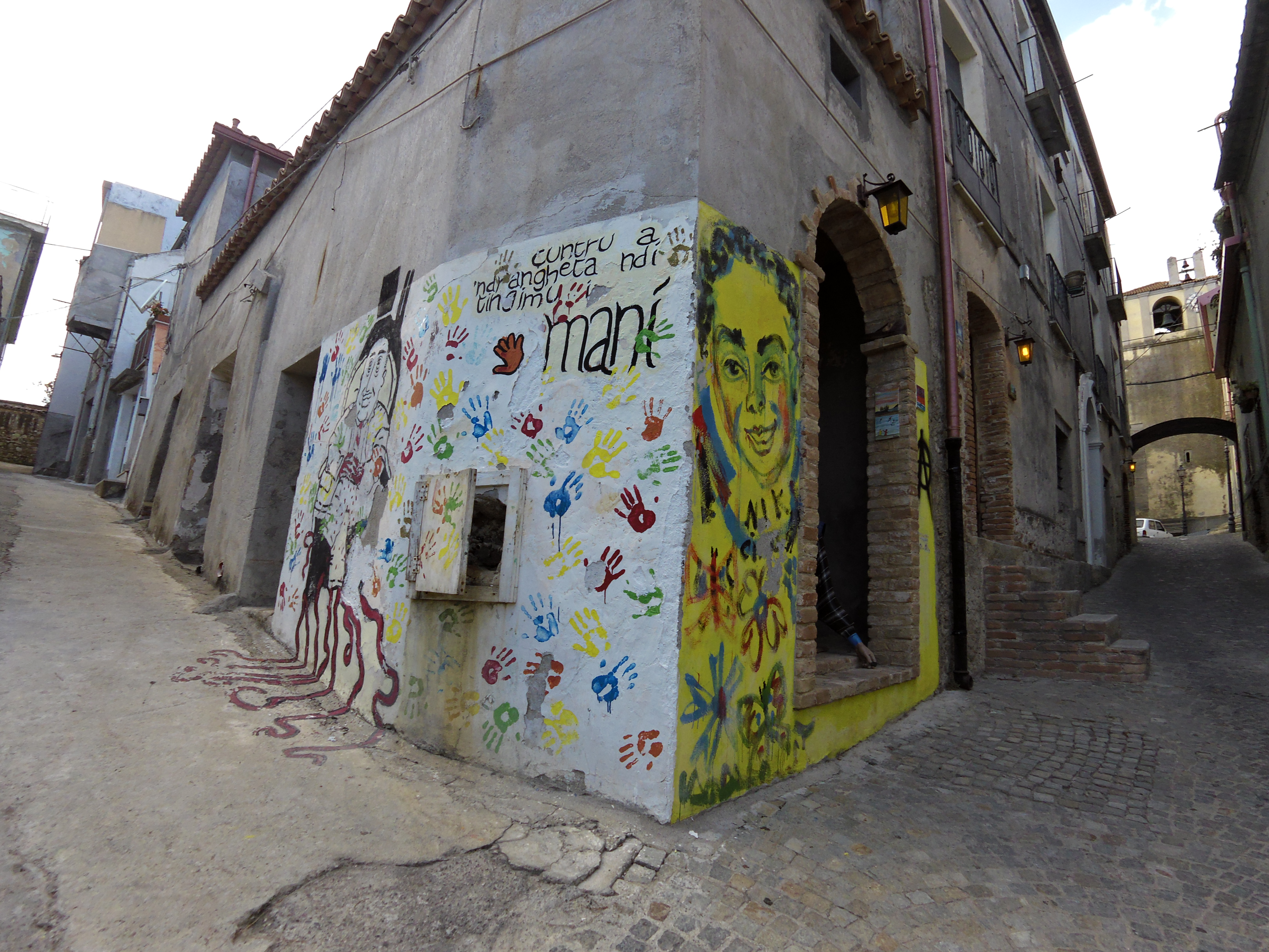 Murale cuntru a ndrangheta mi tingimu i mani (Riace 2018)